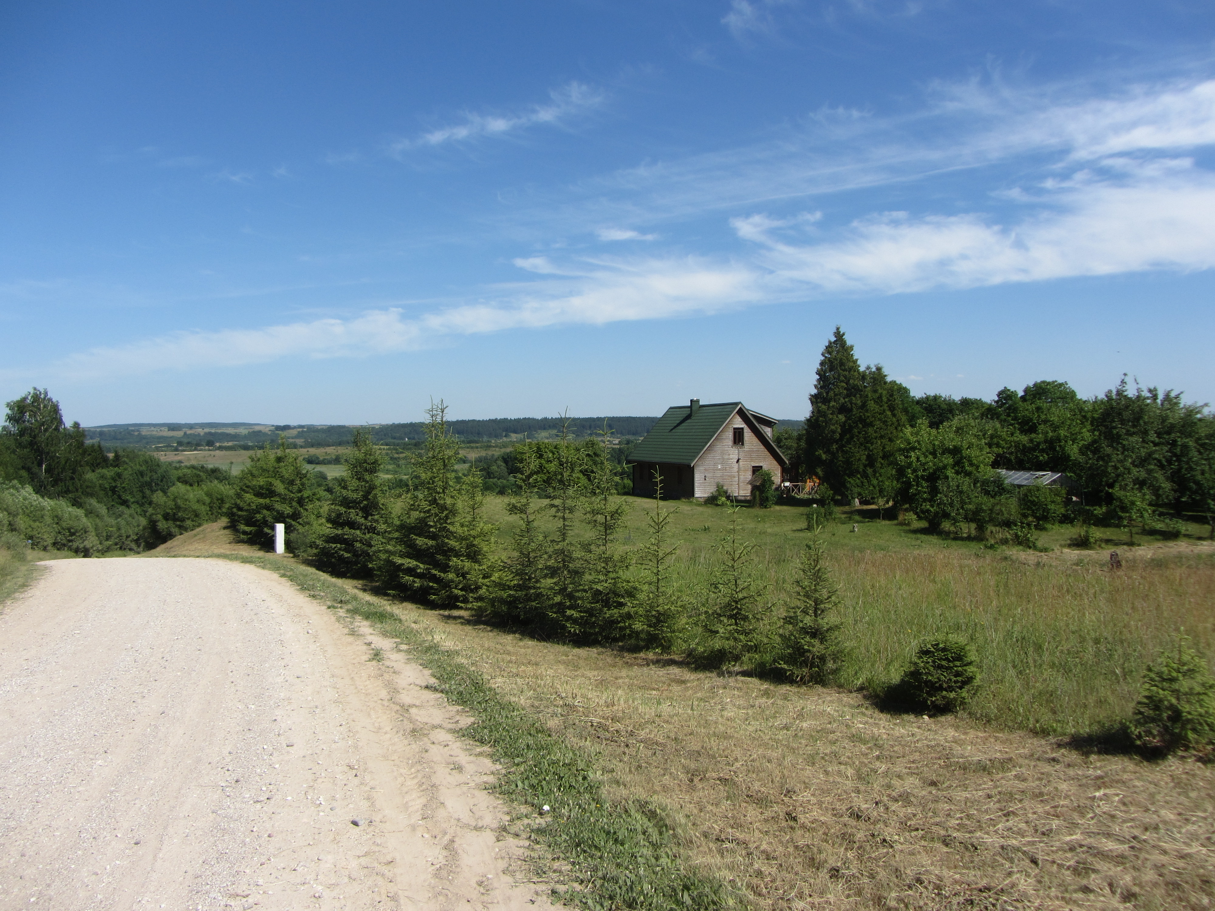 Semeliškių sen., Lithuania